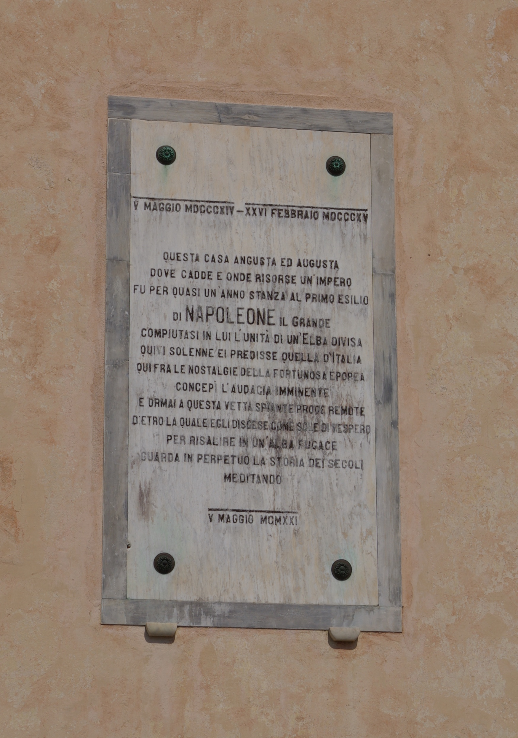 Gedenktafel an der Fassade Palazzina dei Mulini in Portoferraio